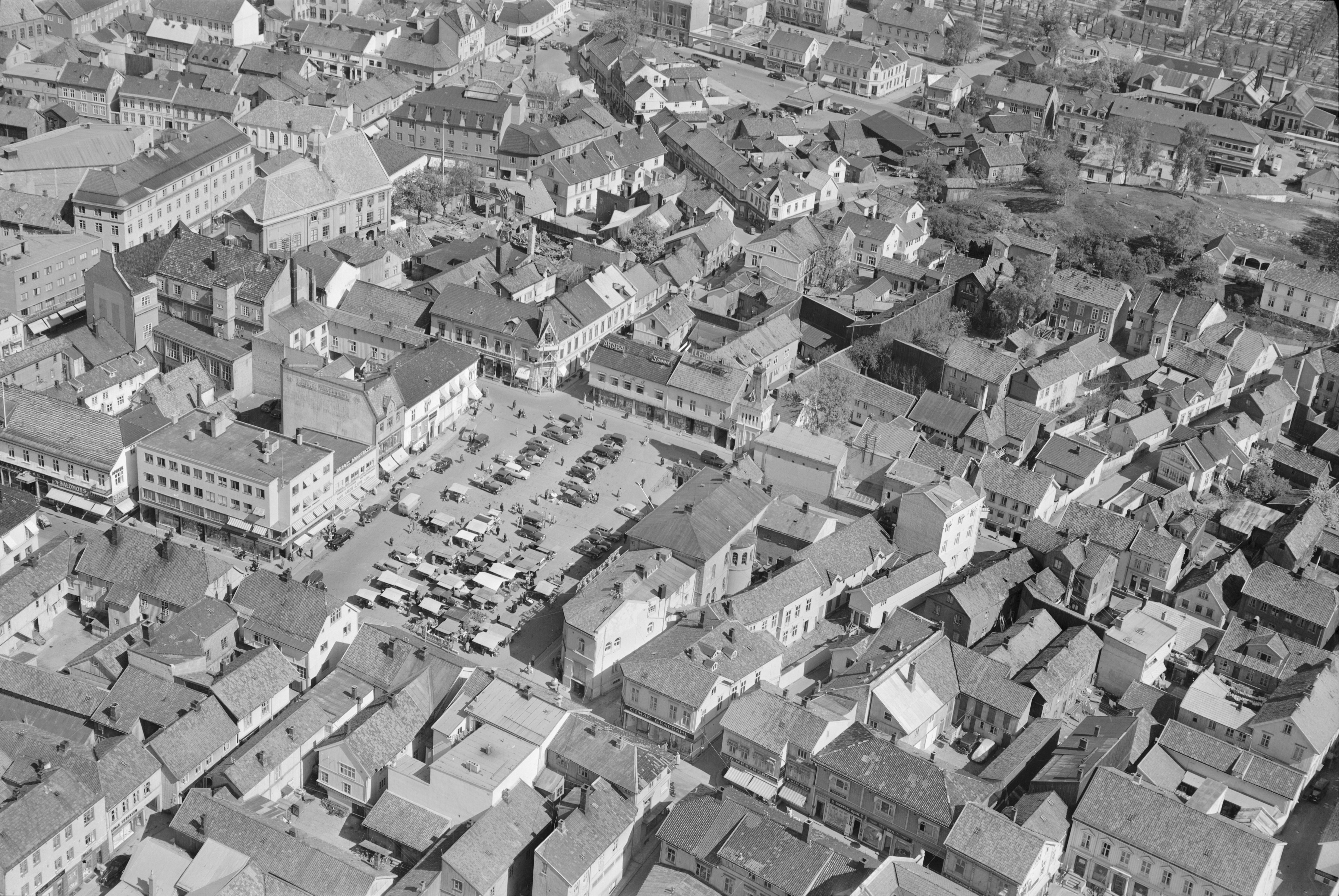 WF.S.A.1144